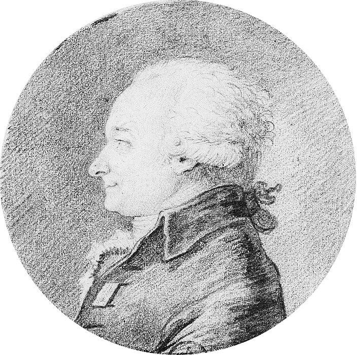 Charles-Alexis Brûlart, marquis de Sillery, comte de Genlis, né le 20 janvier 1737 à Paris, mort guillotiné le 31 octobre 1793 à Paris, est un maréchal de camp français du xviiie siècle. Élu député de la noblesse aux États généraux de 1789, il est l'un des 47 députés de la noblesse ralliés au tiers état.